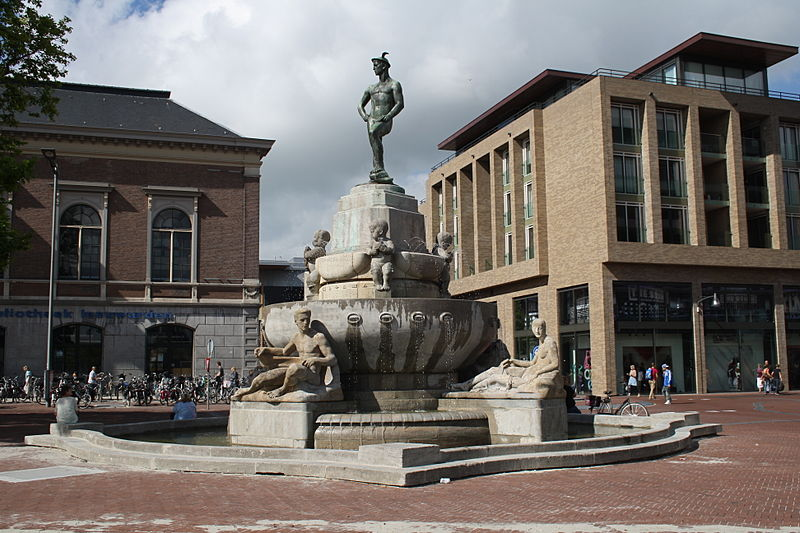 De Mercuriusfontein nabij winkelcentrum "Zaailand" te Leeuwarden. Foto is genomen op 28-9-2006 in de middag